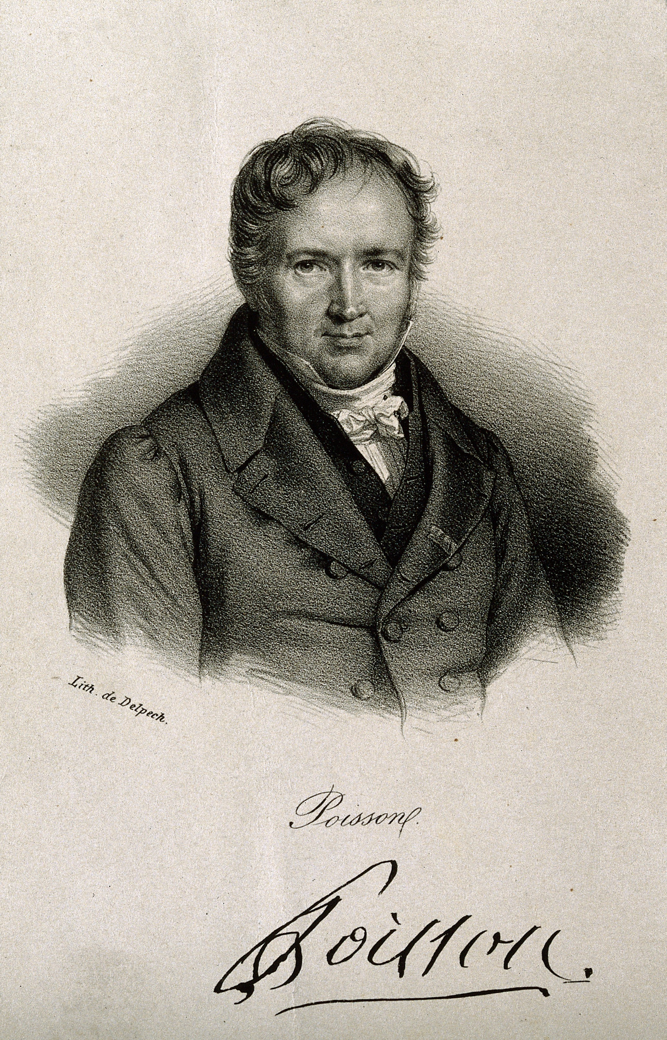 Genre/Technique: Portrait prints. Lithographs. Subject name: Poisson, Siméon-Denis, 1781-1840.